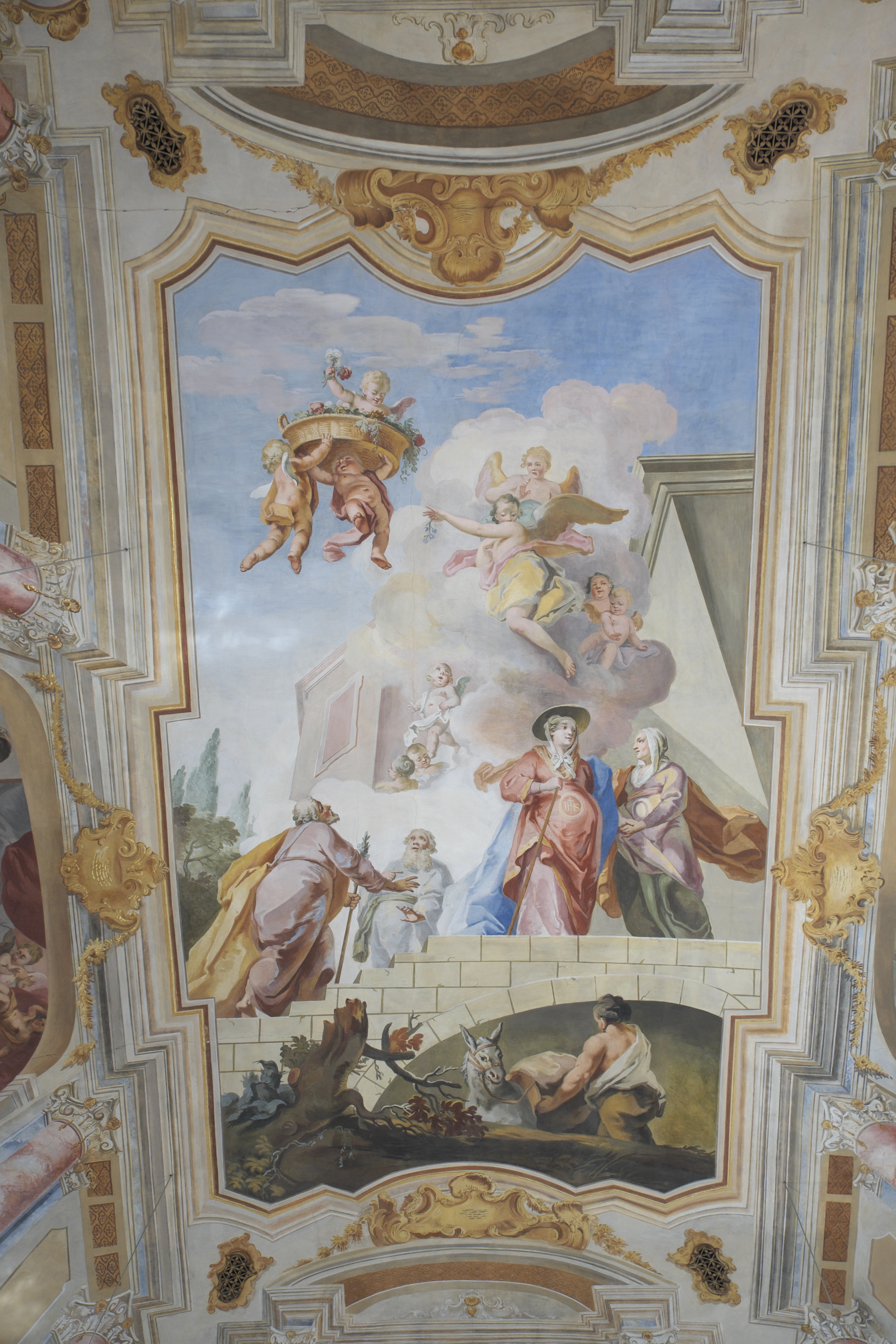 Katholische Pfarrkirche Mariä Heimsuchung in Gosseltshausen (Wolnzach) im Landkreis Pfaffenhofen an der Ilm (Bayern/Deutschland), Deckenfresken im Langhaus von Melchior Buchner (Puchner, Büchner), von 1752; Darstellung: Heimsuchung Mariens